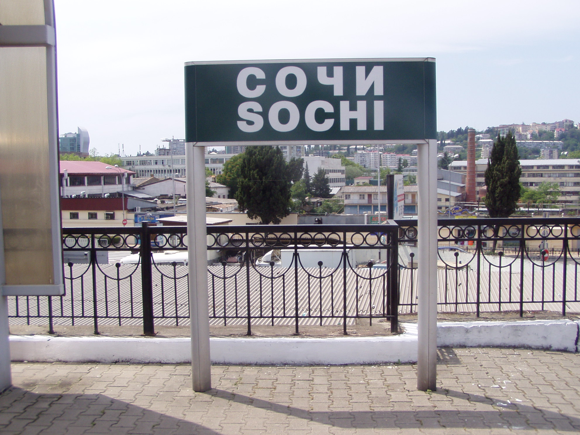 Название станции на перроне ж.д. станции Сочи